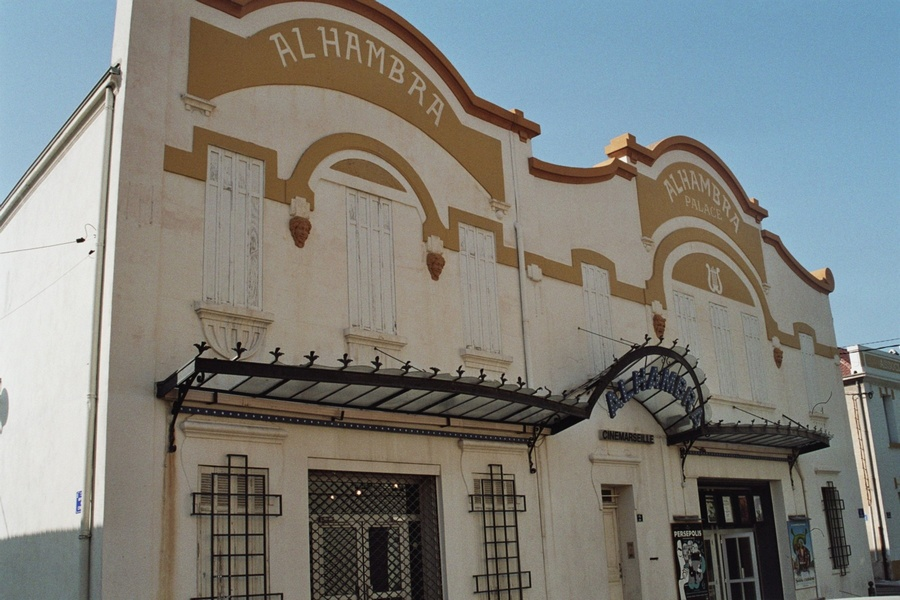 La salle de cinéma "L'Alhambra", à Saint-Henri (Marseille, 16e arr.)